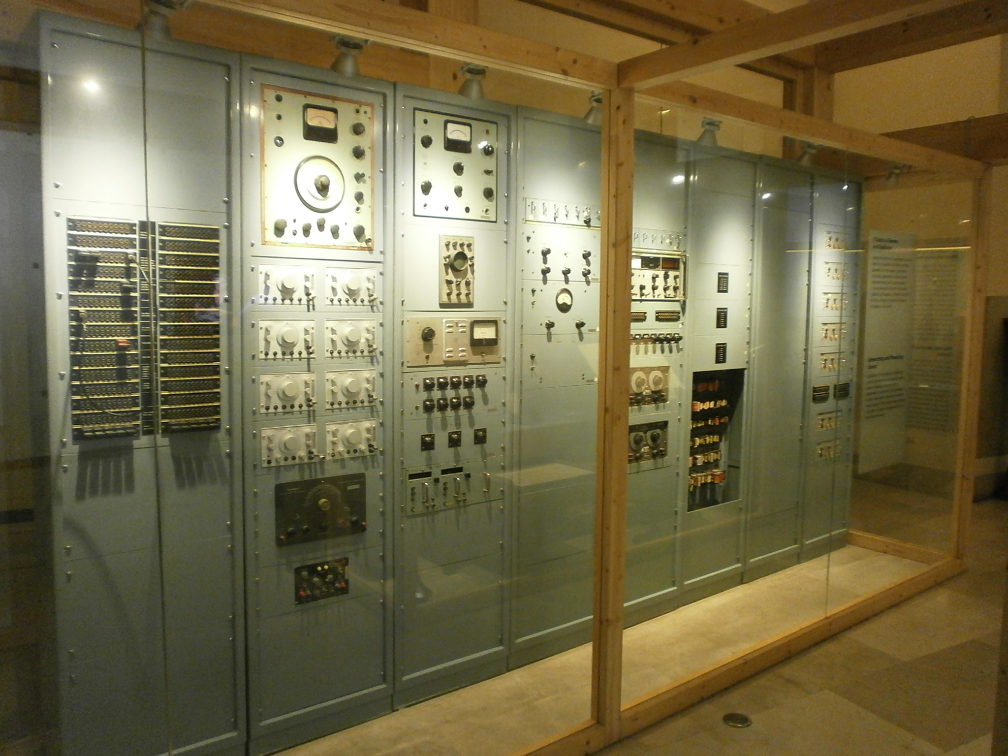 Studio di fonologia del 1955 della sede Rai di Milano - Museo degli strumenti musicali del castello sforzesco - Milano